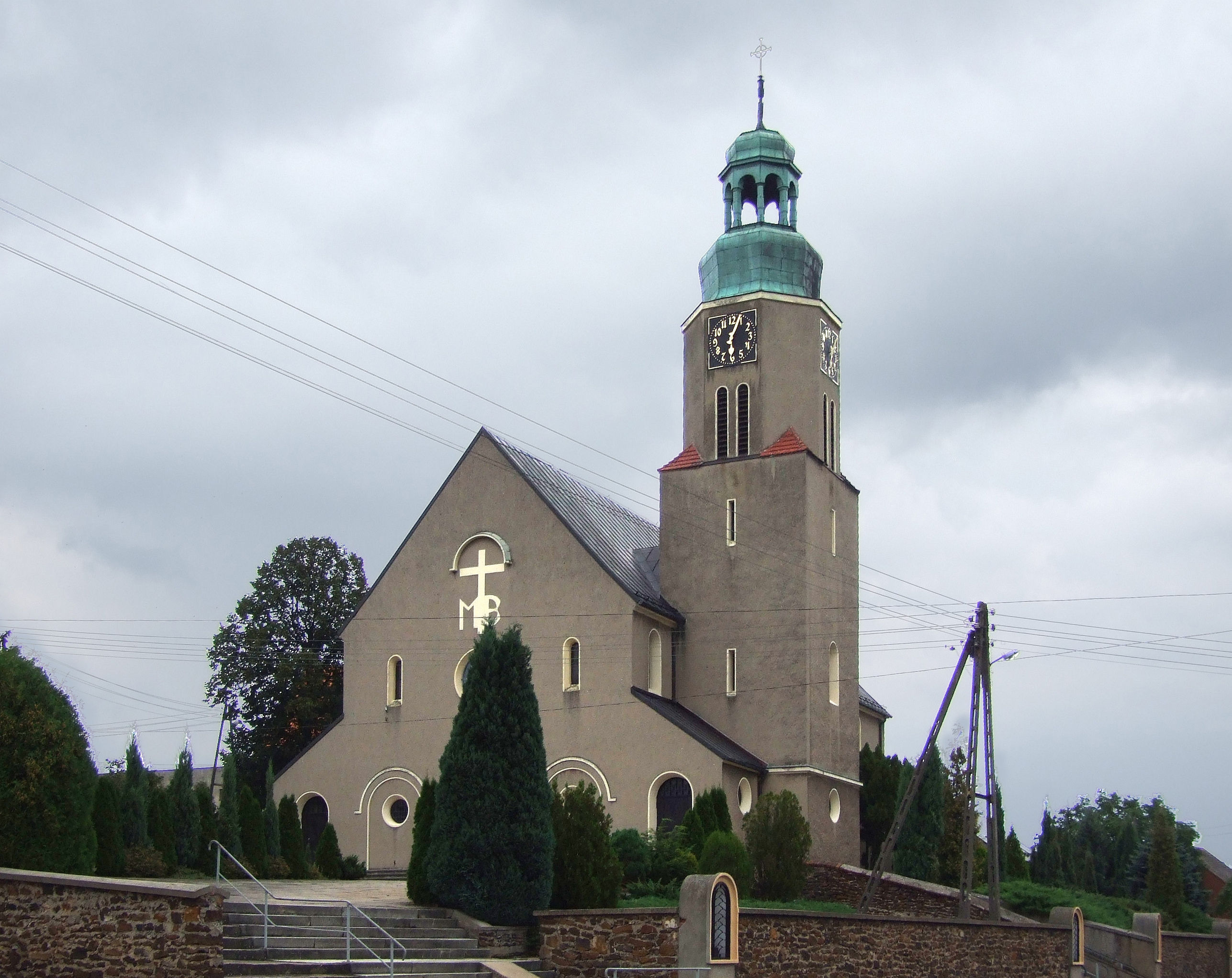 Kościół Narodzenia Najświętszej Marii Panny w Bodzanowicach